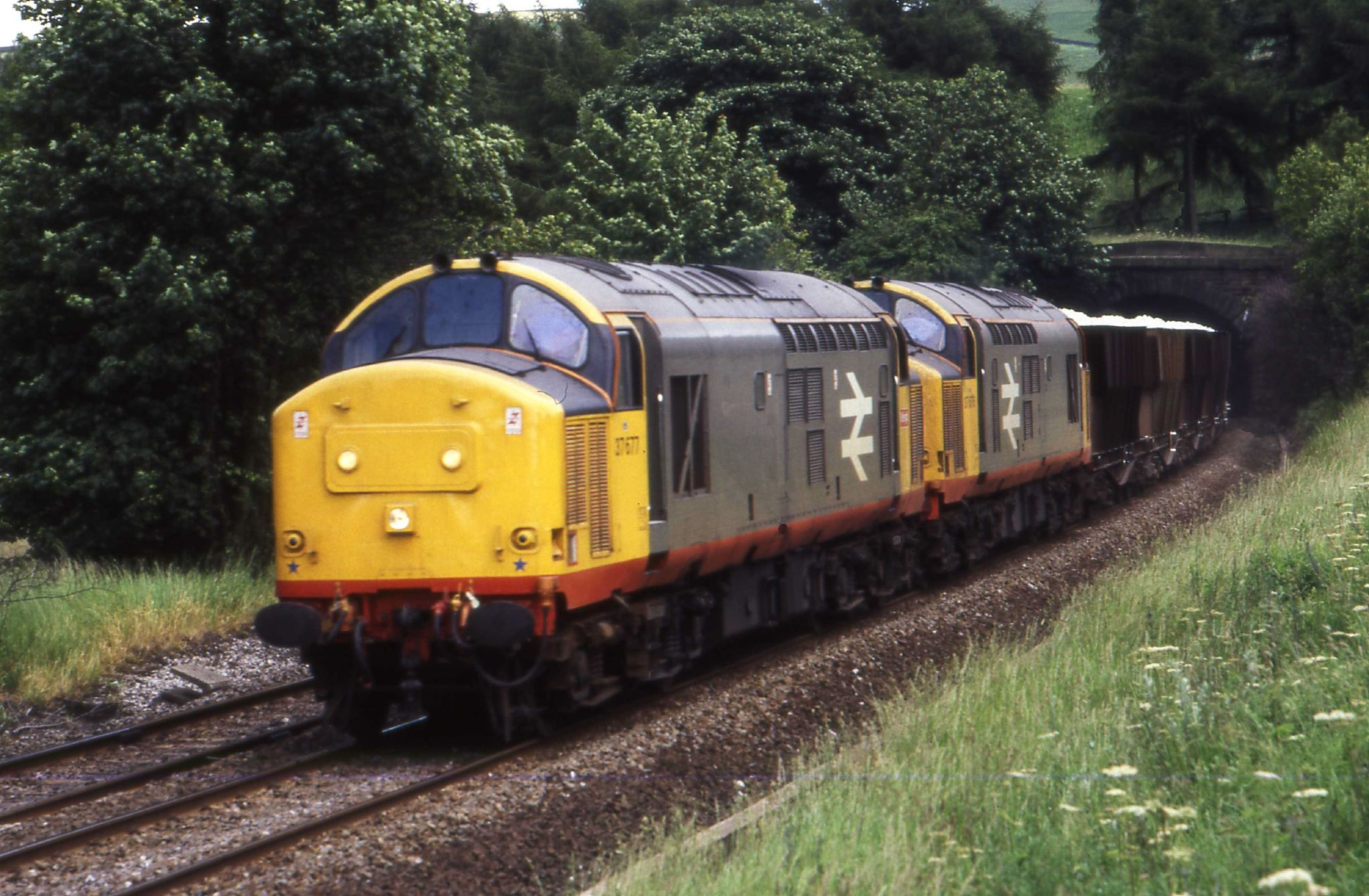 Leaving Doveholes Tunnel